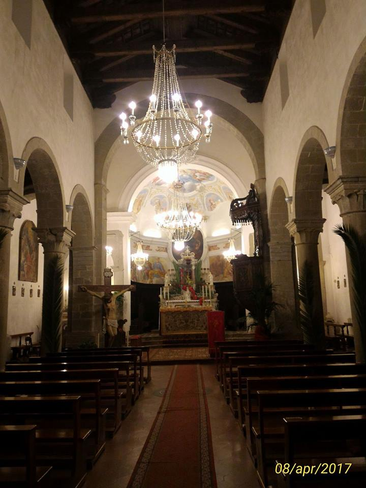 Interni Matrice Savoca